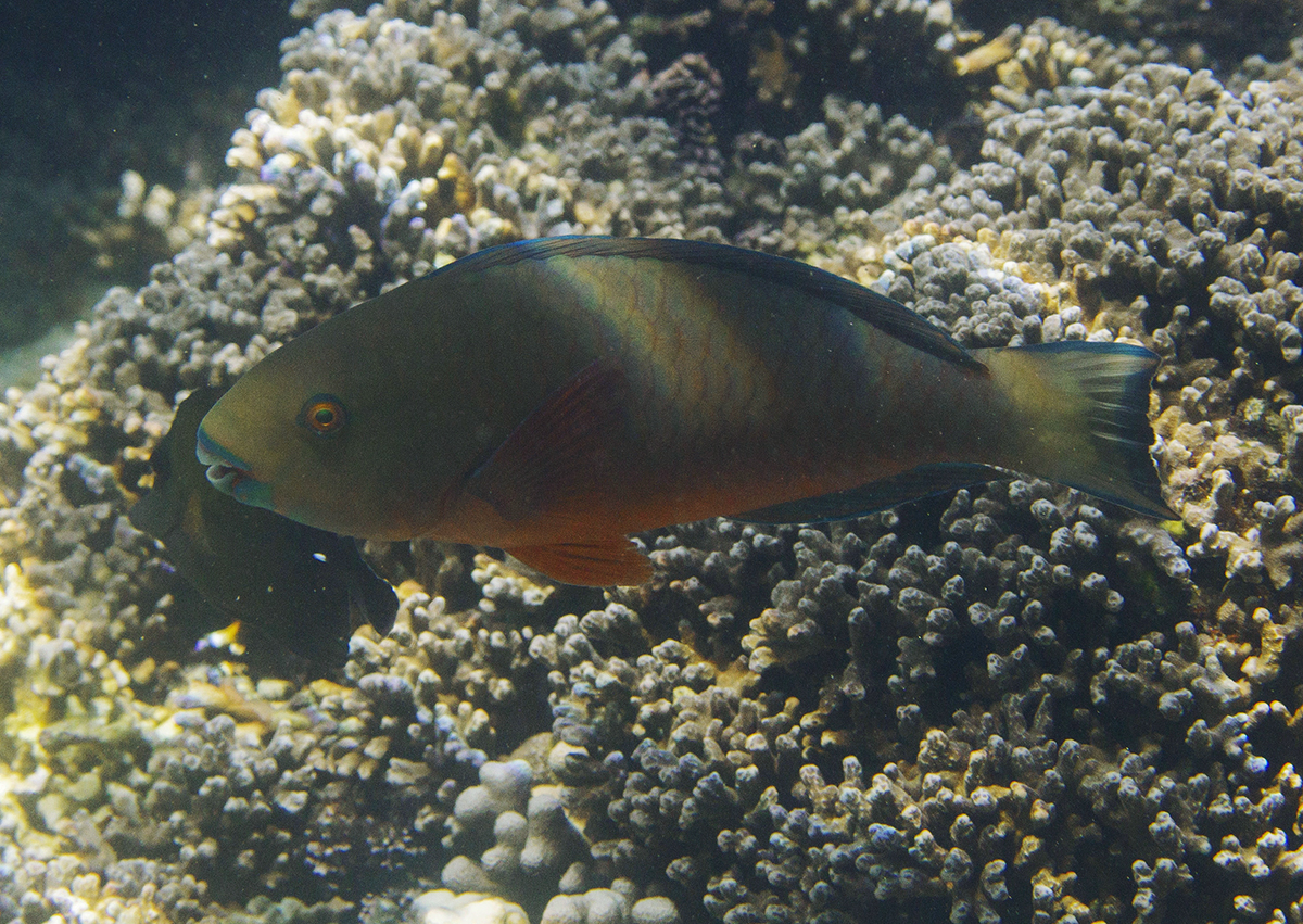 Poisson-perroquet grand-bleu (Chlorurus strongylocephalus) en stade initial à la Réunion.